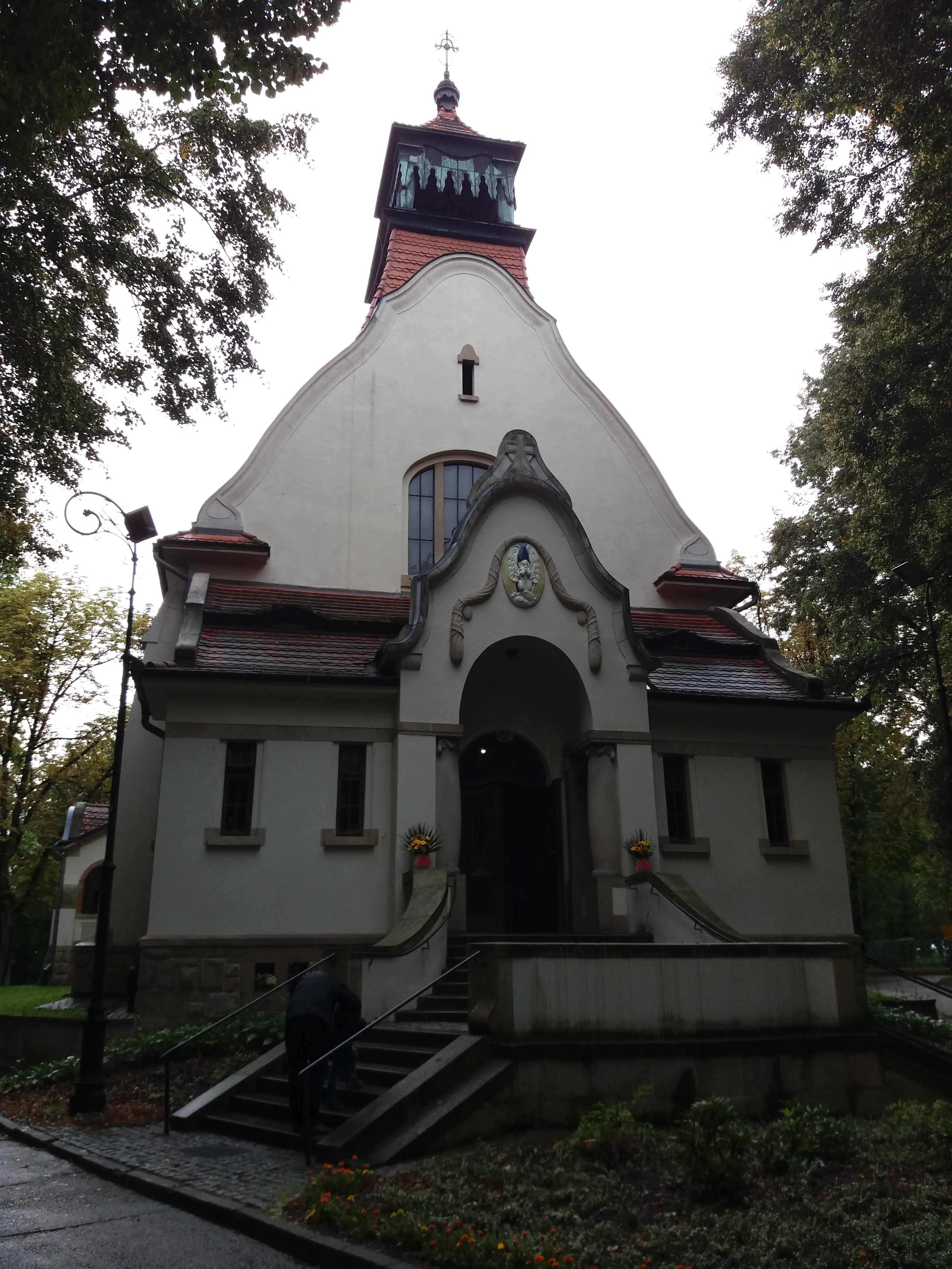 Kaplica Rektoralna Matki Bożej Częstochowskiej w Krakowie-Kobierzynie